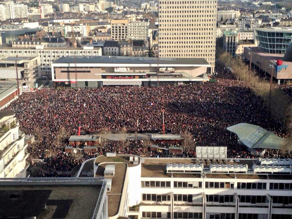 Grande marche républicaine du 11 Janvier 2015 à Rennes. 115 000 personnes rassemblées. Rennes est Charlie !